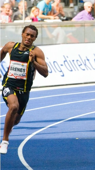 400 m during 2010 ISTAF Berlin (Nery Brenes)